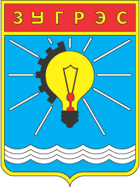 Герб Зугрэса (СССР)